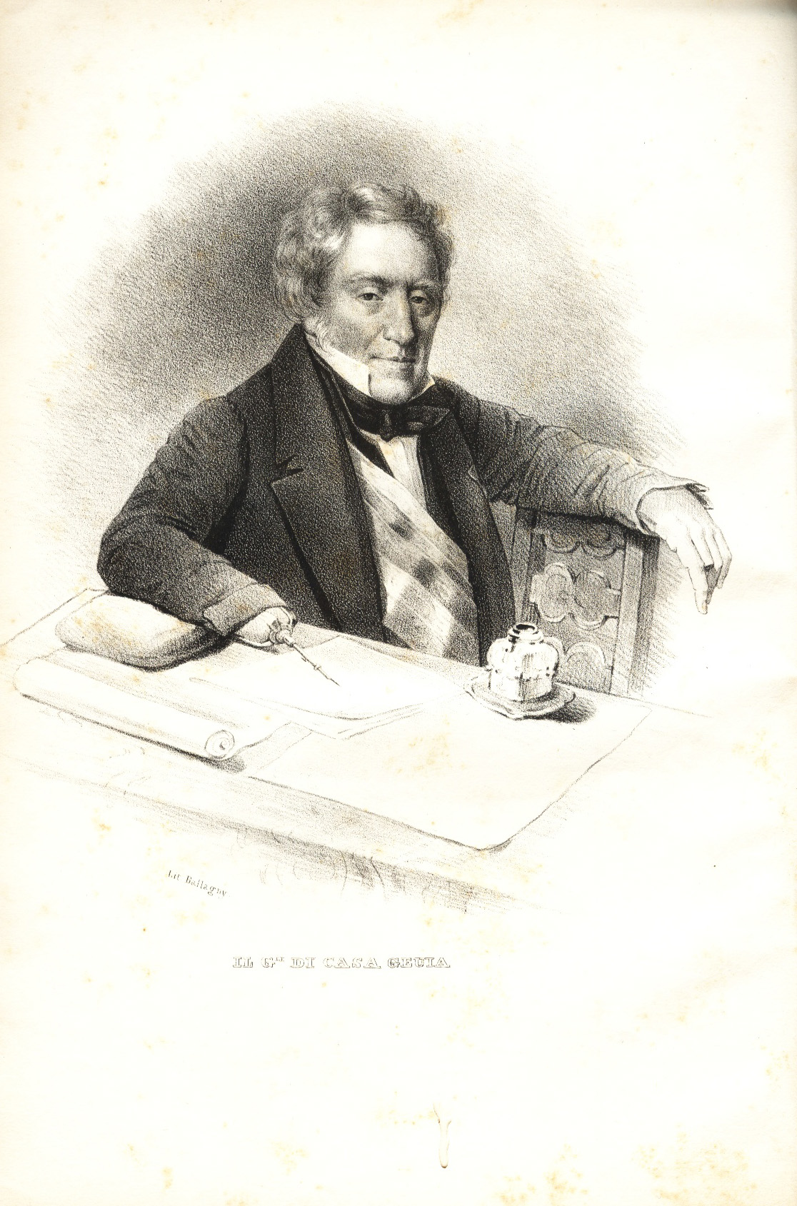 Nazario de Eguía. Dibujo de Isidoro Magués. "Don Carlos e i suoi difensori". Firenze 1837